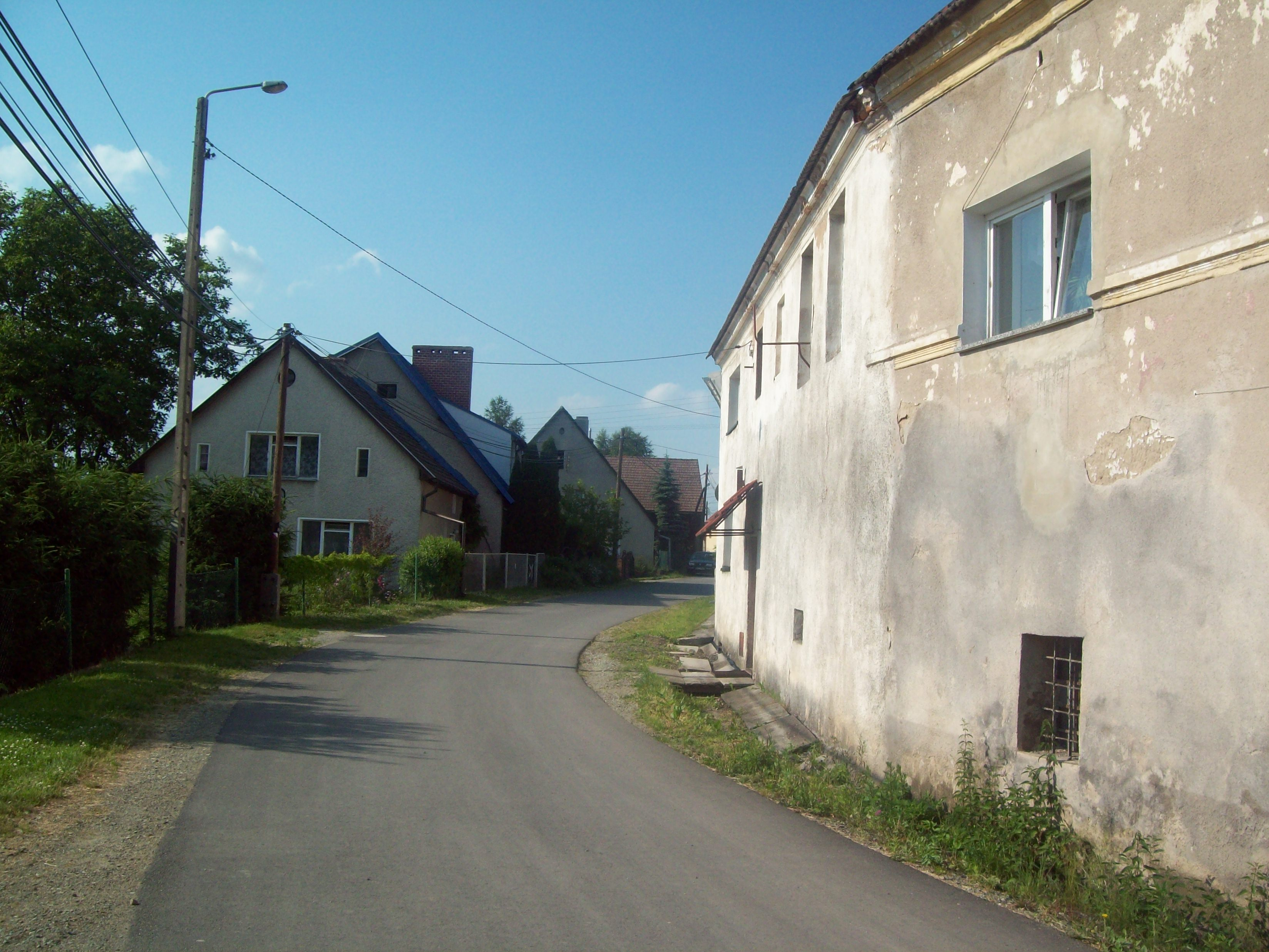 Widok na Boguszyn od strony ul. Zamiejskiej w Kłodzku